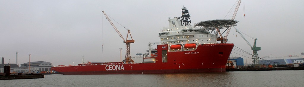 Die Ceona Amazon liegt in Bremerhaven bei der Lloydwerft